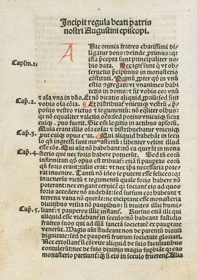 Anfang der Augustinusregel: Allem zuvor, geliebte Brüder, werde Gott geliebt, sodann der Nächste; denn diese Vorschriften sind uns als Hauptsache gegeben.